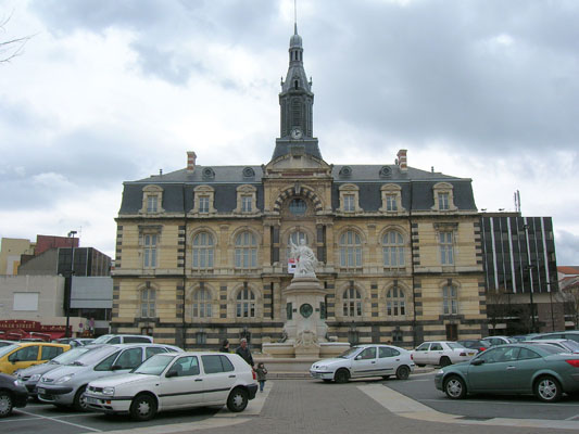 Hôtel de ville de Roanne